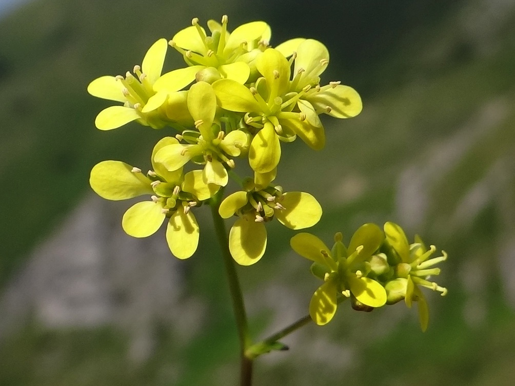 Biscutella laevigata (habitat:West Tatra Mountains)